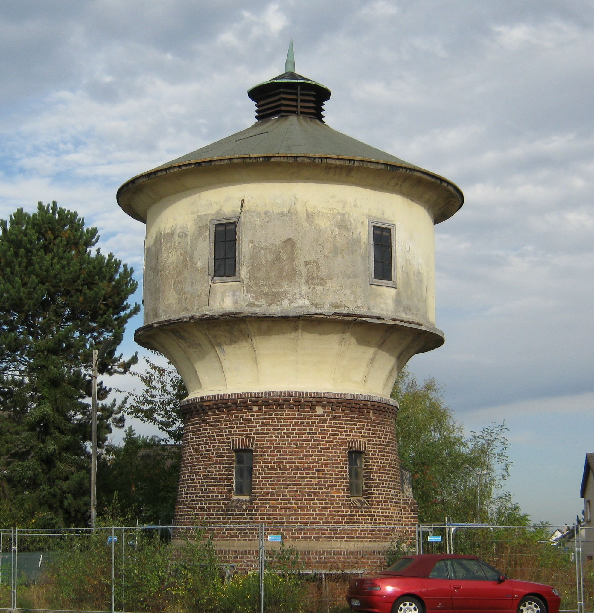 Wasserturm in Gielsdorf, Alfter